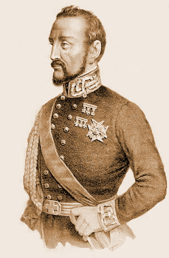 Saverio Pistolesi, "Ritratto del generale Giacomo Durando", litografia.